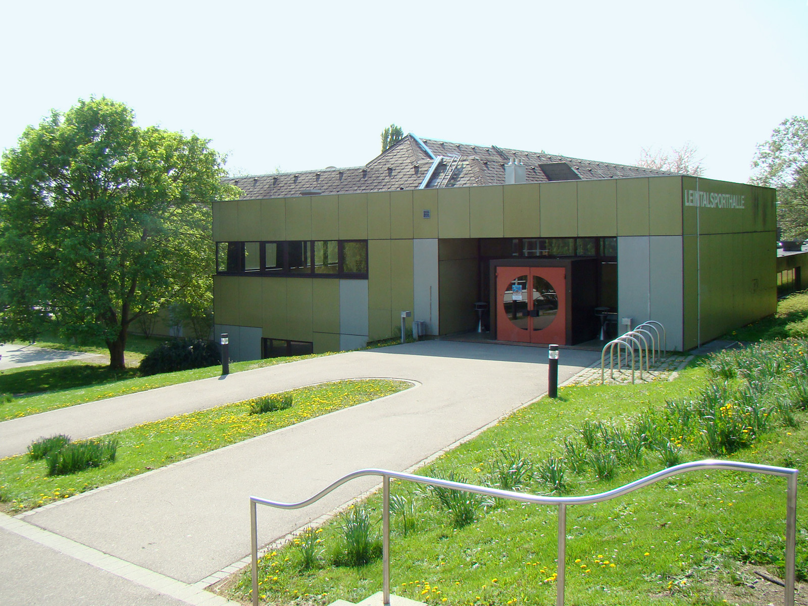 Leintalhalle in der Würzburger Straße in Heilbronn-Frankenbach